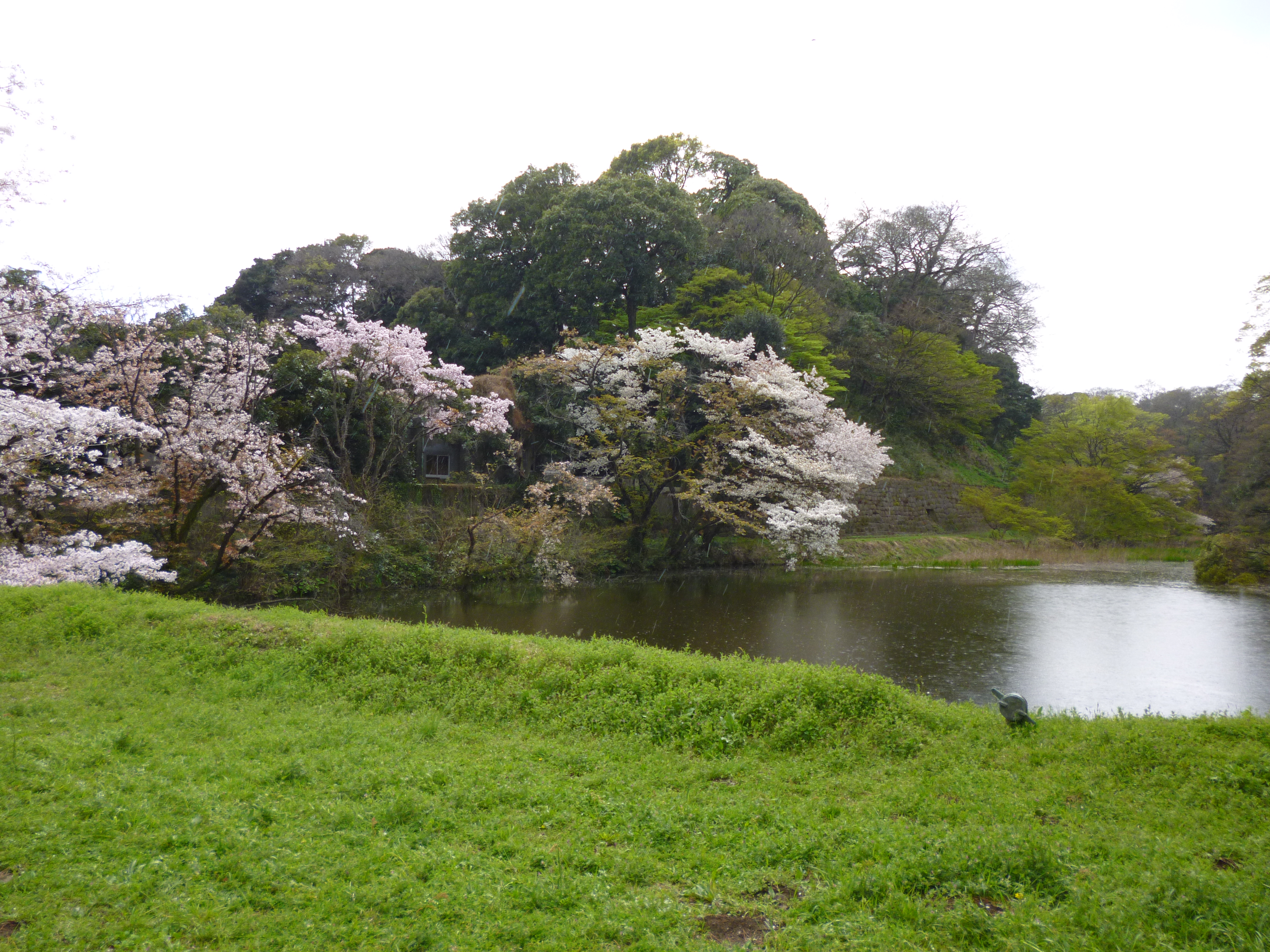 皇居（江戸城）内に残る太田道灌時代の堀とされる